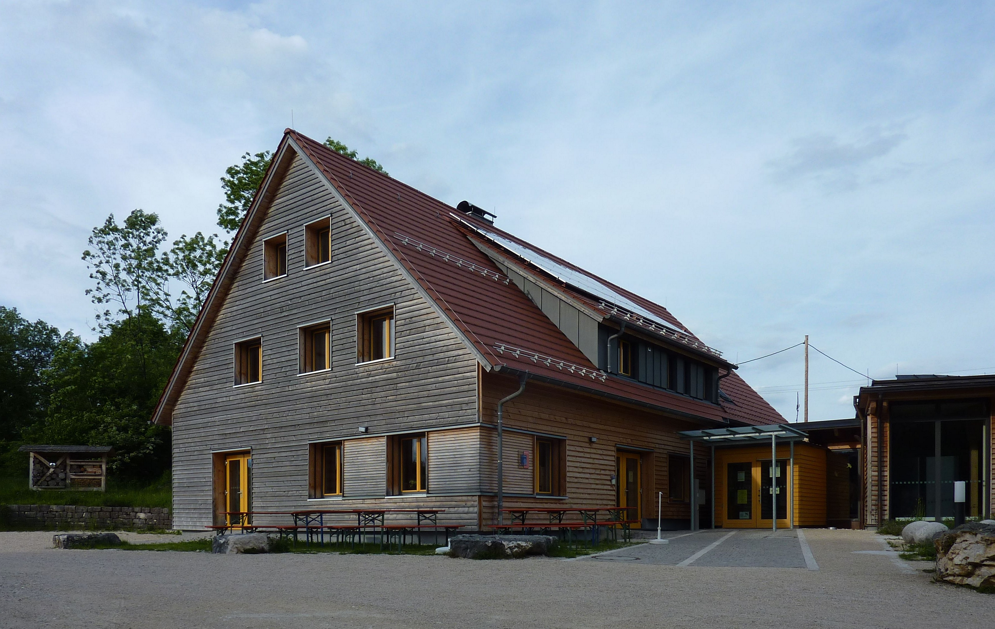 Naturschutzzentrum bei Schopfloch